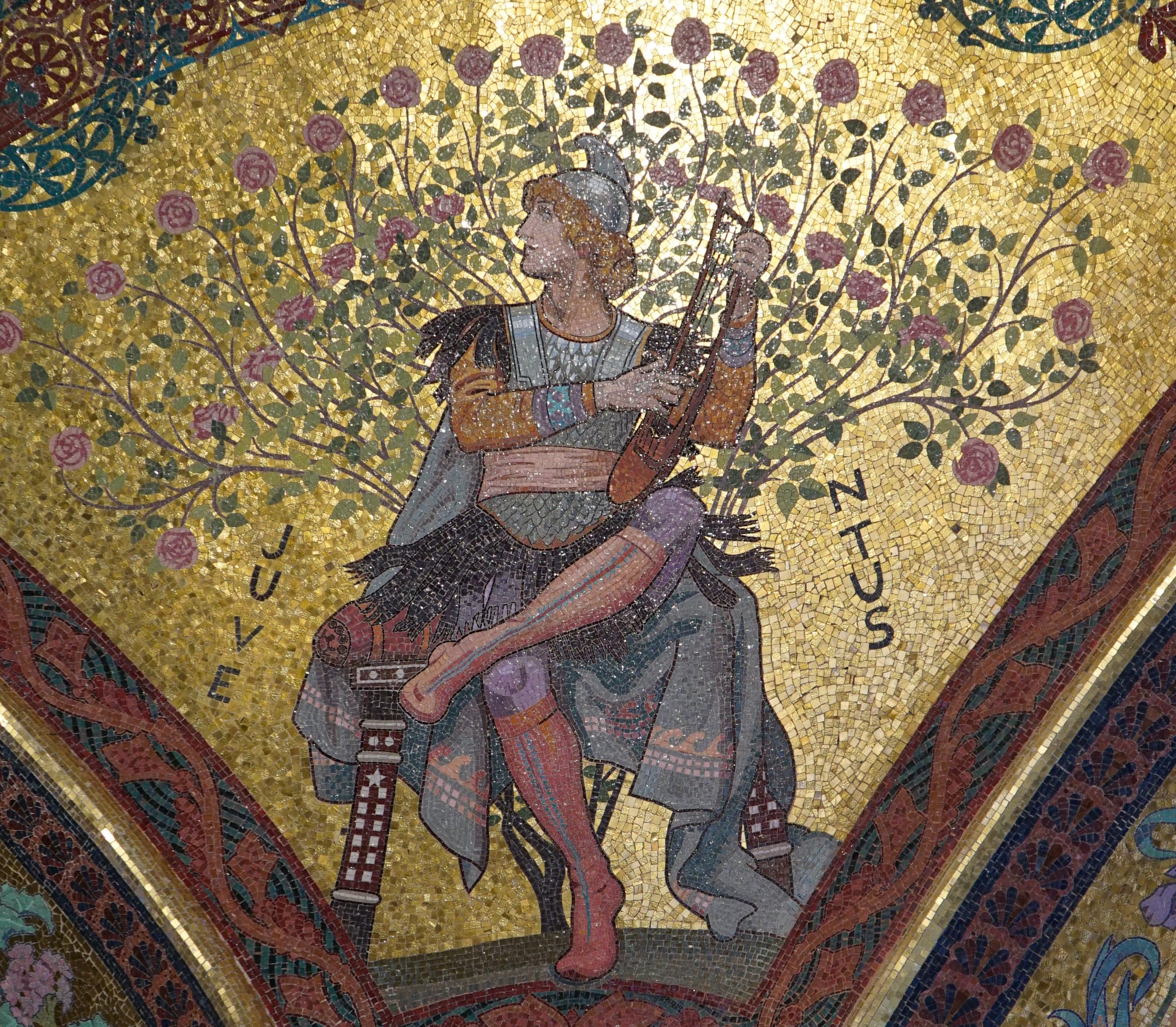 vue du Mausolée de Bourgogne.